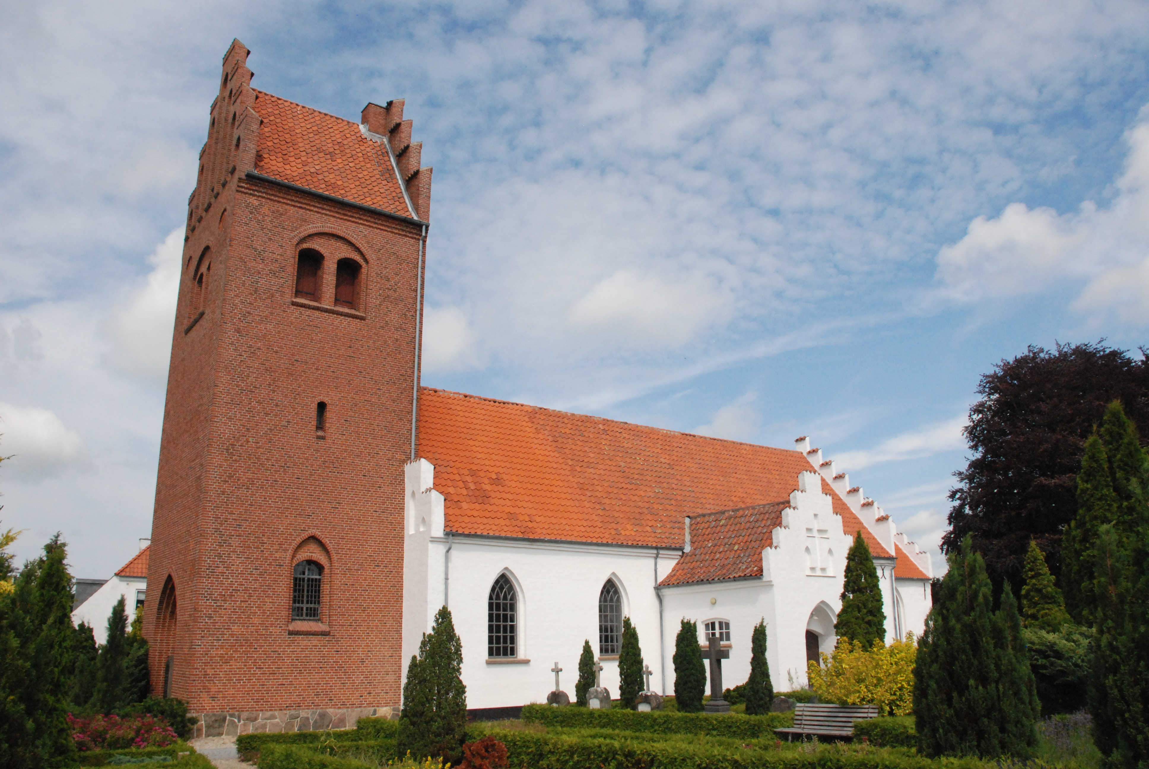 Mårum Kirke, Mårum Sogn, Holbo Herred, Frederiksborg Amt, Danmark.